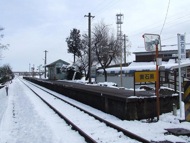 JR東石黒駅